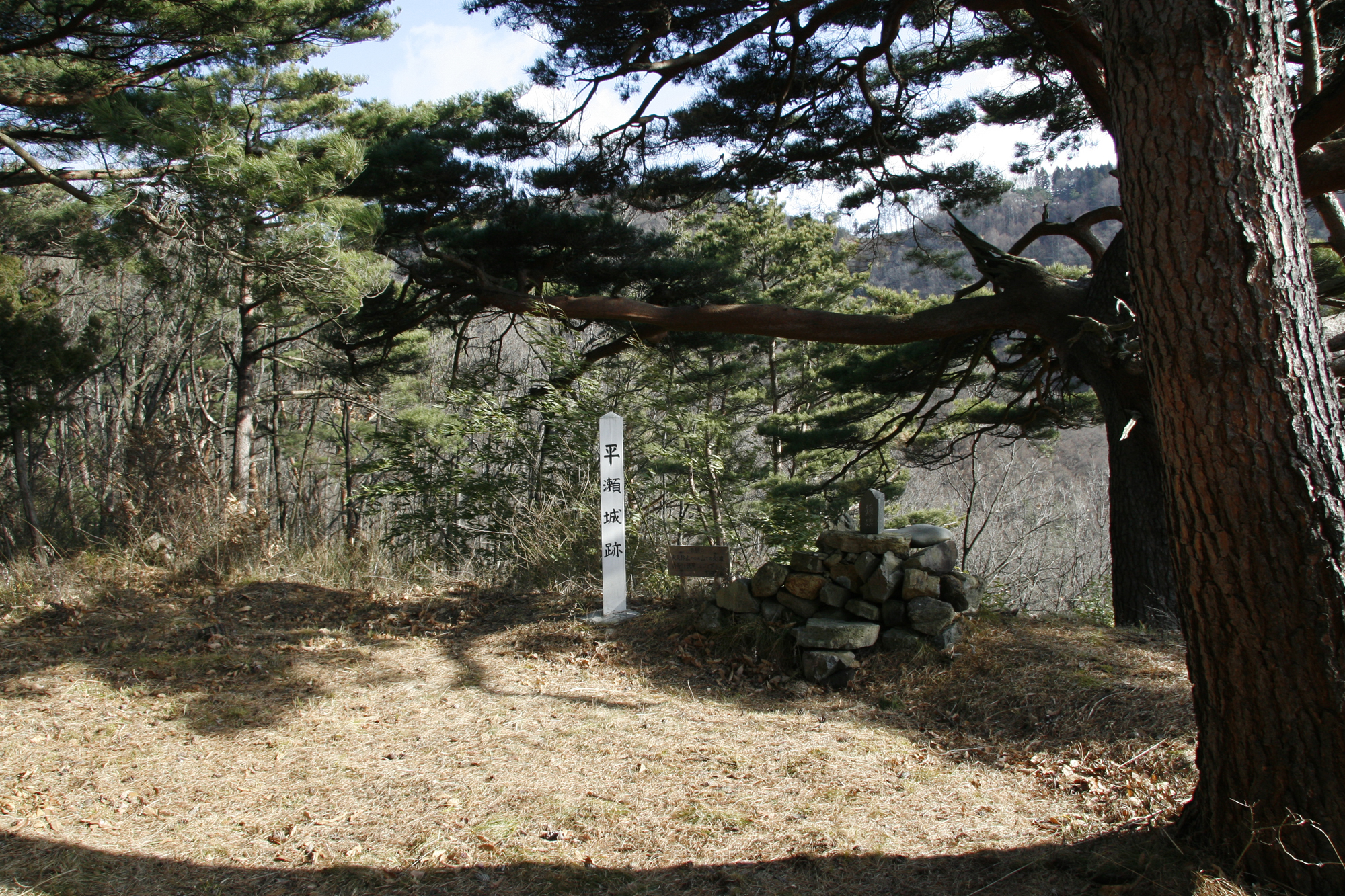 平瀬城主郭部